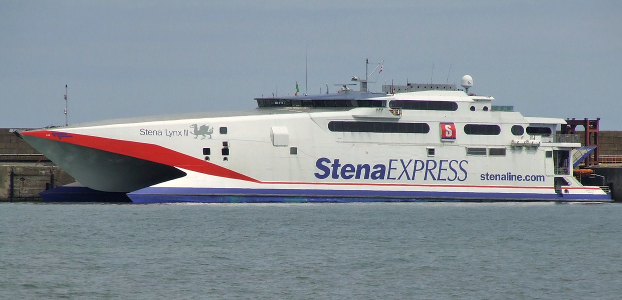 Stena Express